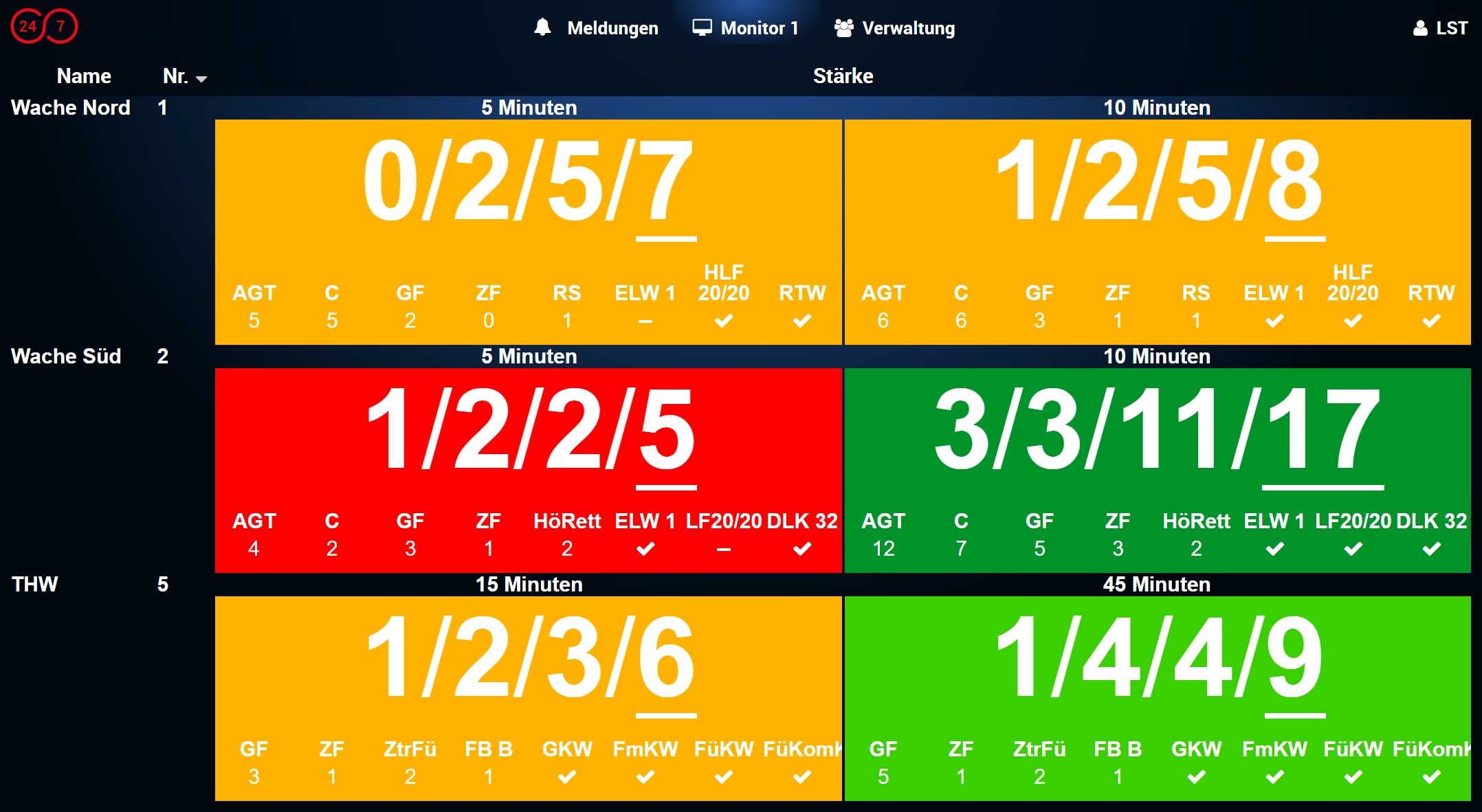 Monitor einer Leitstelle für ein Verfügbarkeitsystem